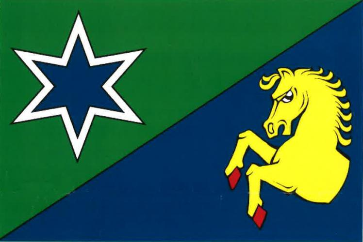 Pěčnov vlajka